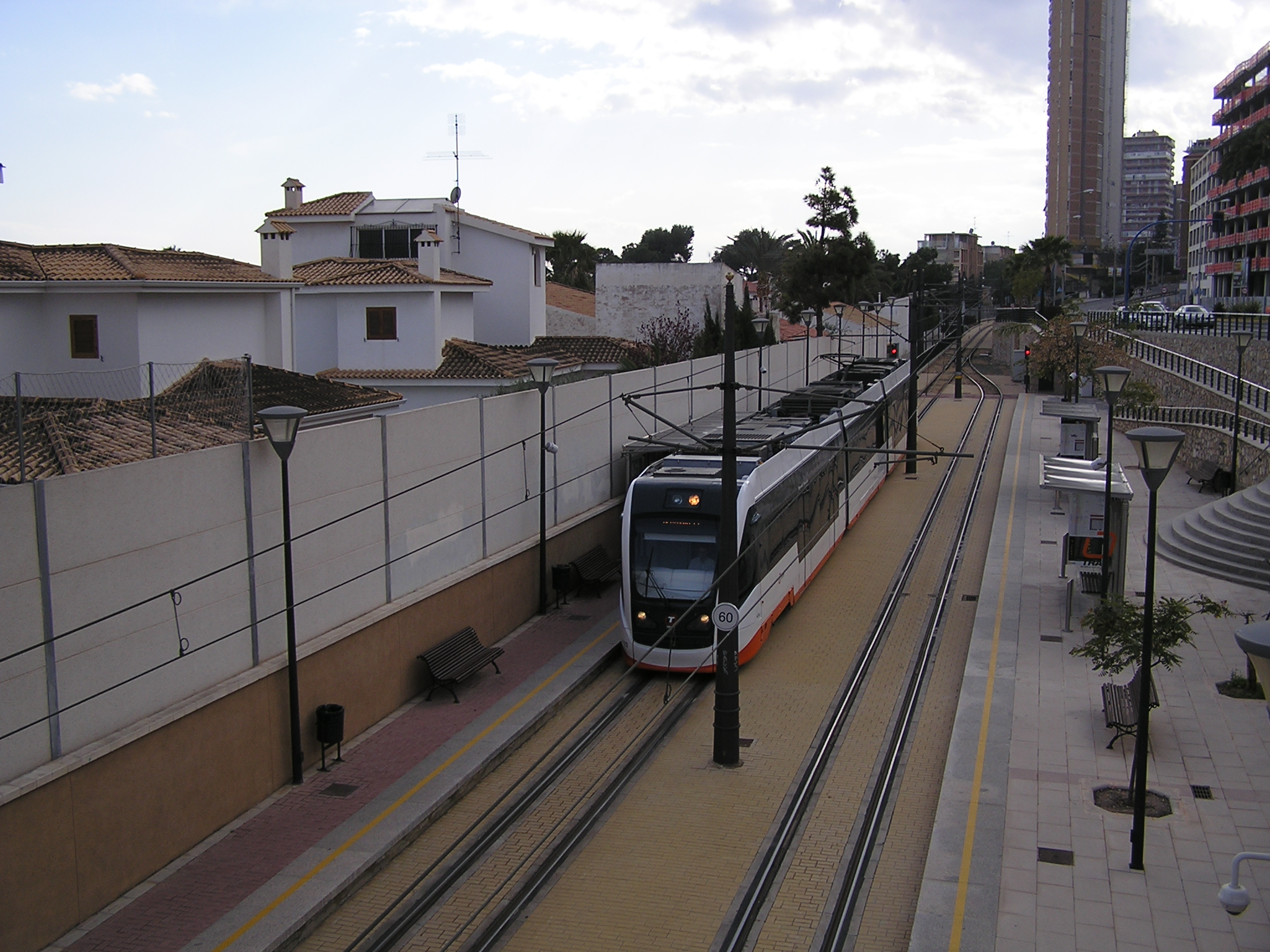 La Isleta. Tram Stop. Alicante Tram.